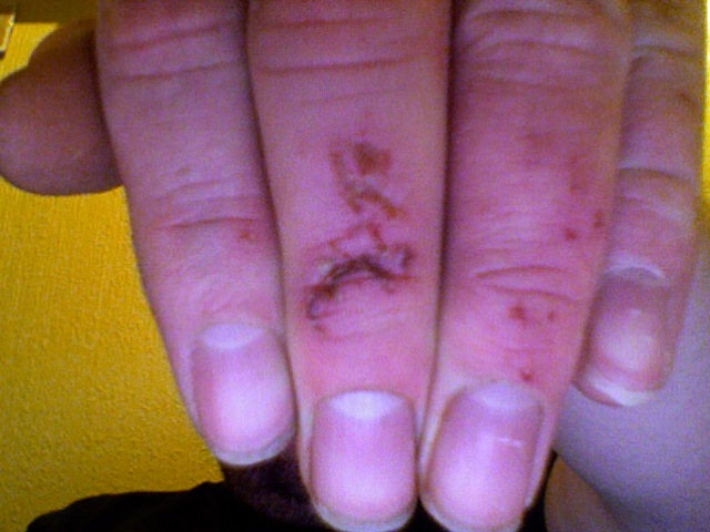 Wound from ski-fall